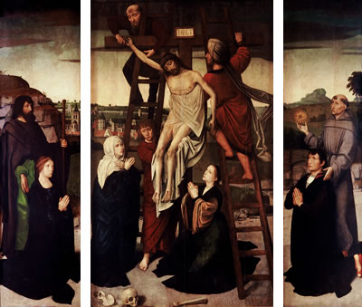 Painel Central: Descida da Cruz Volante direito: São Bernardino de Siena e o Doador (anverso) (reverso a grisalha cinzenta: Santa Luzia) Volante esquerdo: São Tiago Maior e a Doadora (anverso) (reverso a grisalha cinzenta: São Tiago Menor)